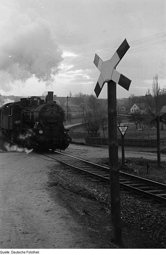 Original image description from the Deutsche Fotothek Zug mit Dampflokomotive überfährt einen unbeschrankten Bahnübergang mit Andreaskreuz